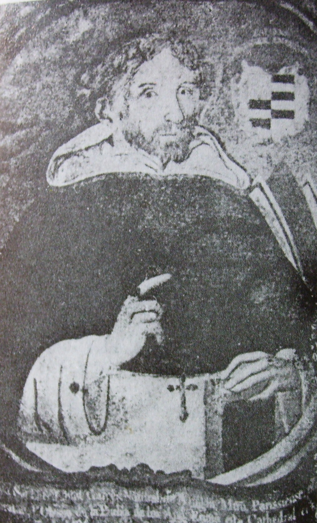 El obispo de Puebla Fray Julián Garcés, cuadro del antiguo Obispado, fotografía digital del libro "Las Calles de Puebla" de Hugo Leicht